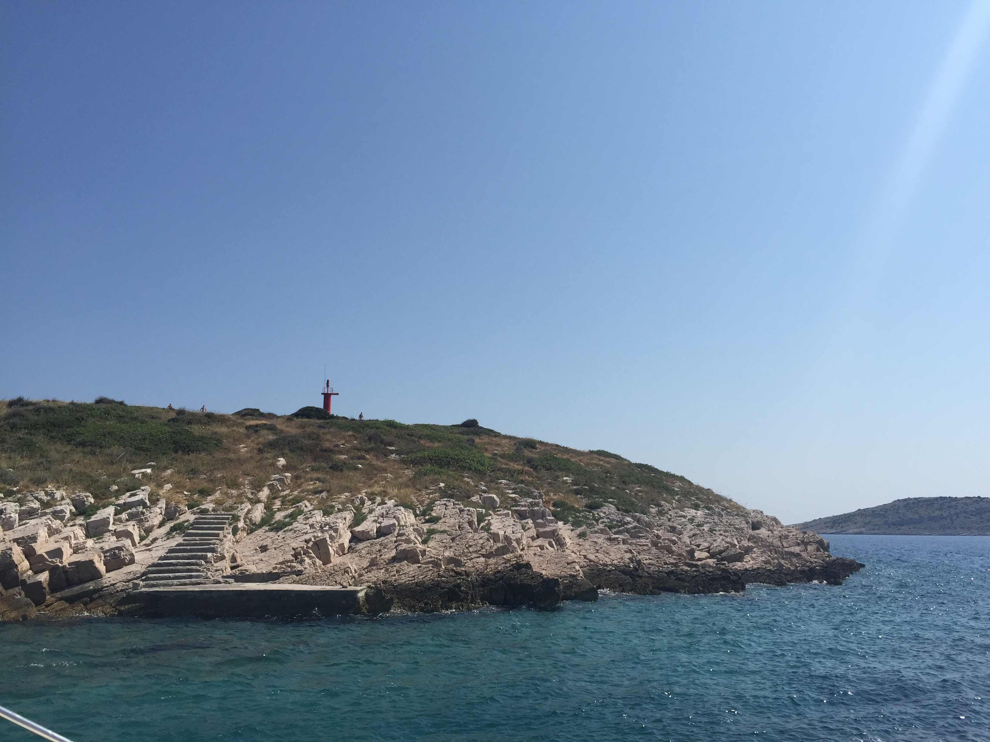 Općina Šibenik, Croatia